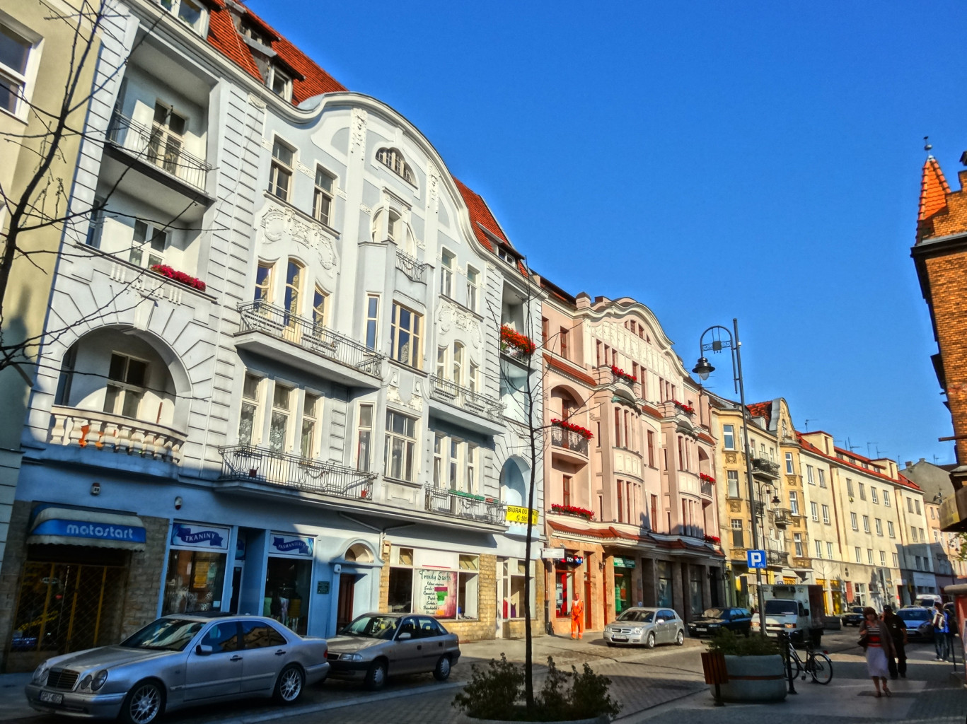 Ulica Dworcowa w Bydgoszczy na odcinku od ul. Warmińskiego do ul. Królowej Jadwigi